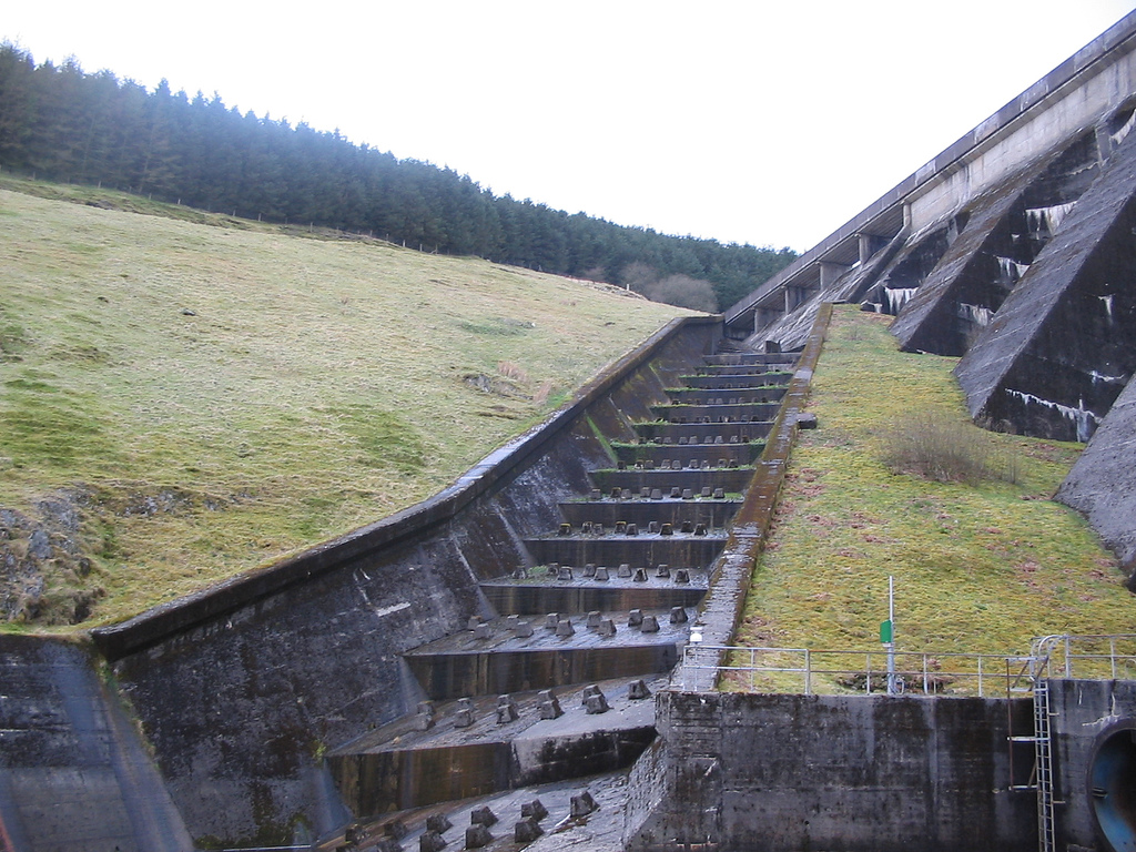 Nant y moch dam spillway.